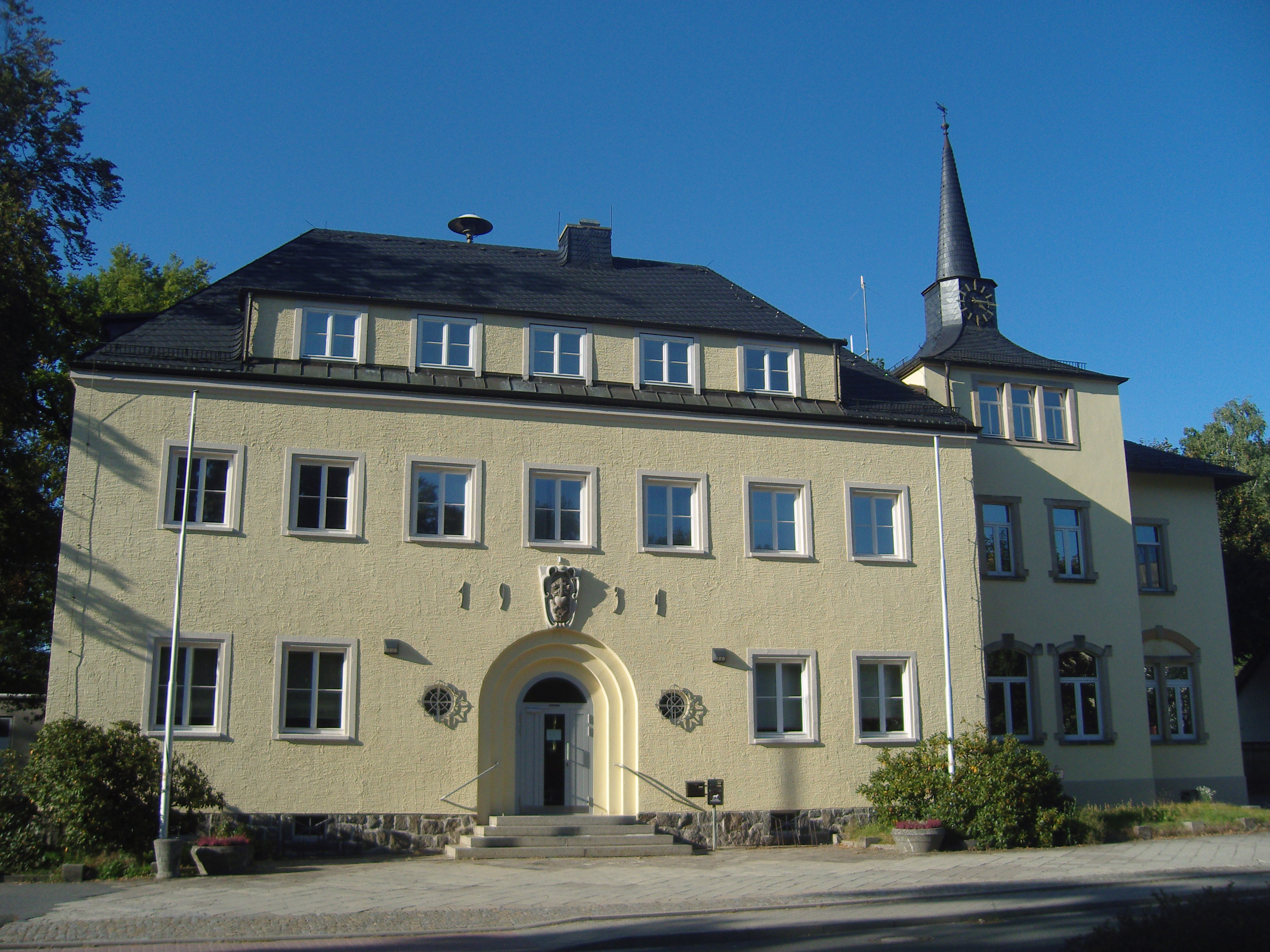 Gemeindeverwaltung Ottendorf-Okrilla; denkmalgeschütztes Rathaus in der Radeburger Straße 34